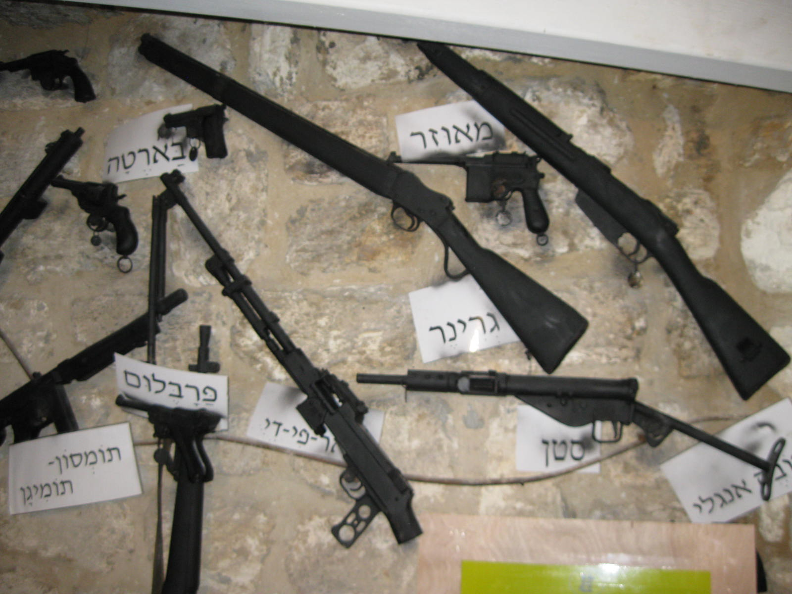 מערת הפלמ"ח במשמר העמק